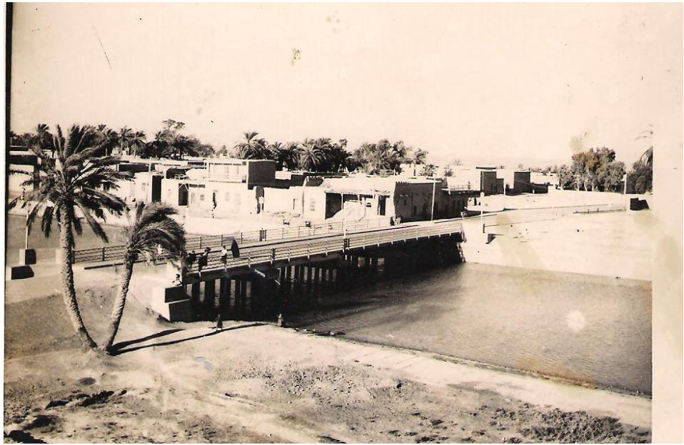 صوره قديمه لجسر قضاء المجر الكبير